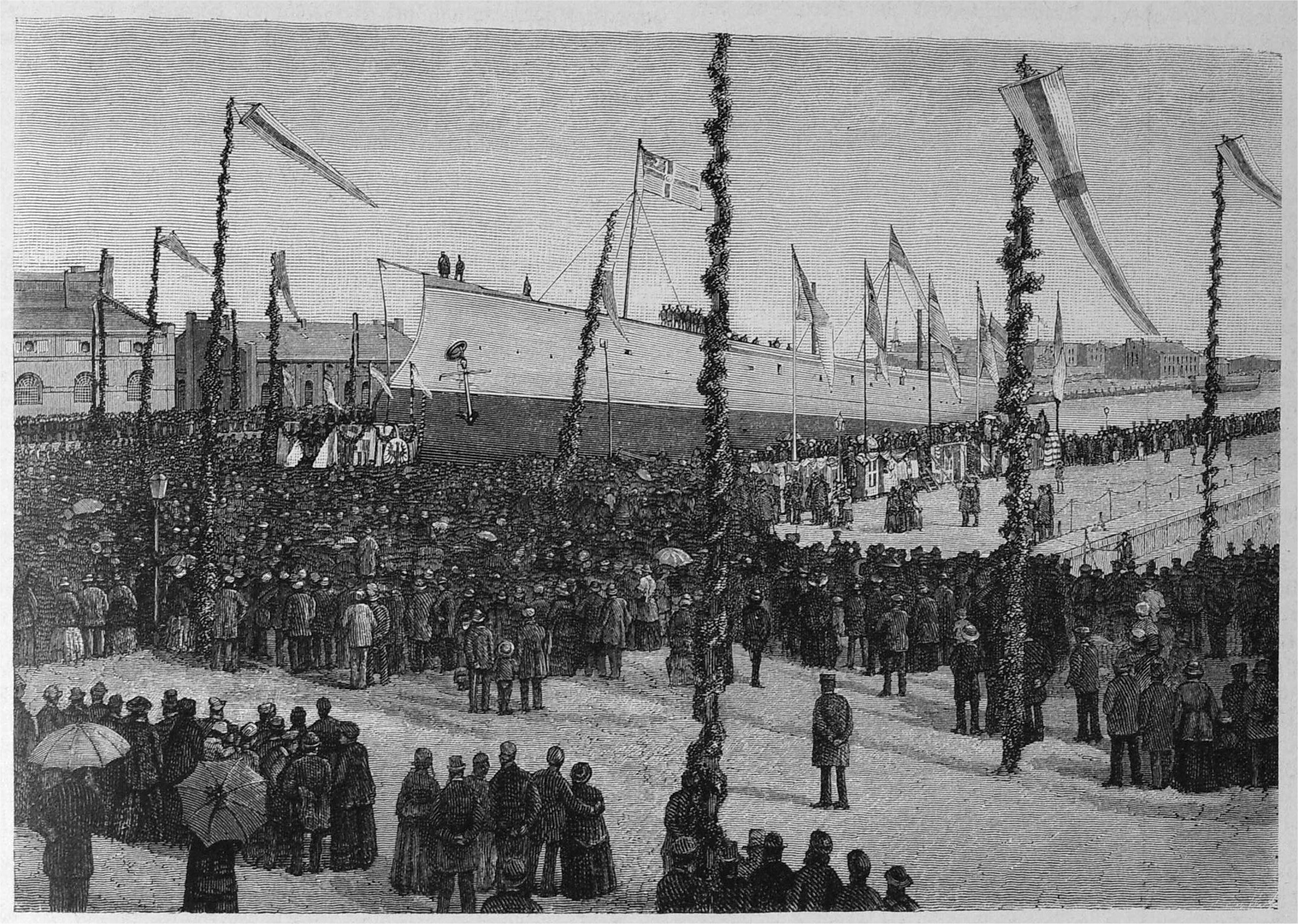 Taufe des Aviso "Pfeil" in Wilhelmshaven